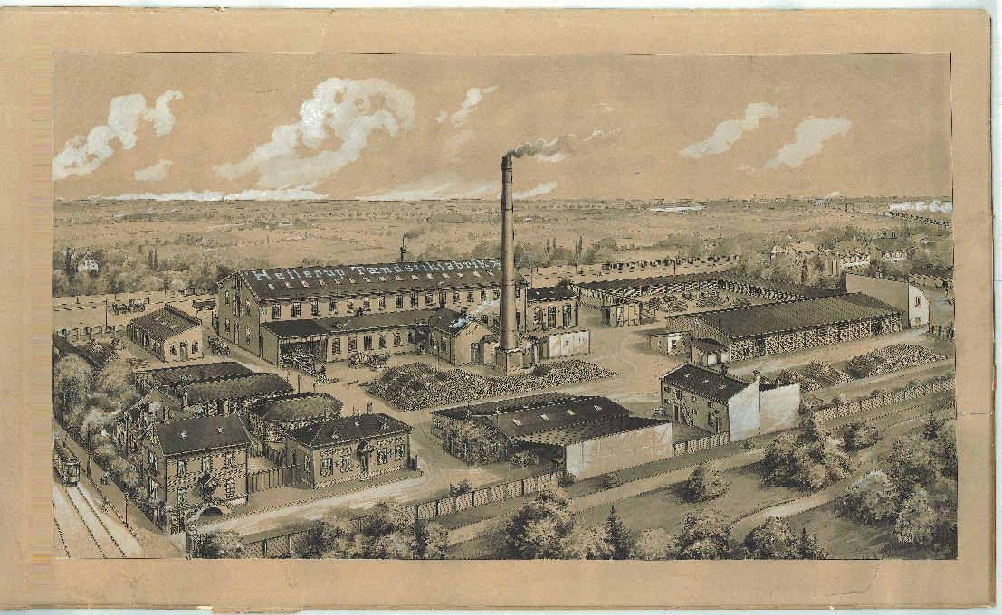 Hellerup Tændstikfabrik på Hellerupvej, ca. 1910.